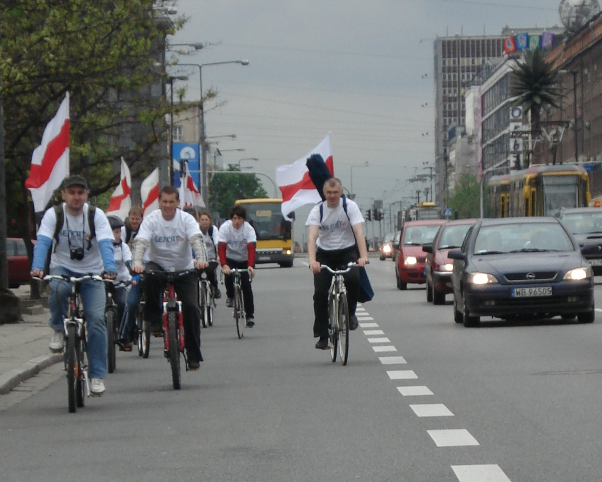 Rowerowy Rajd Pamięci Stanisława Bułak-Bałachowicza.